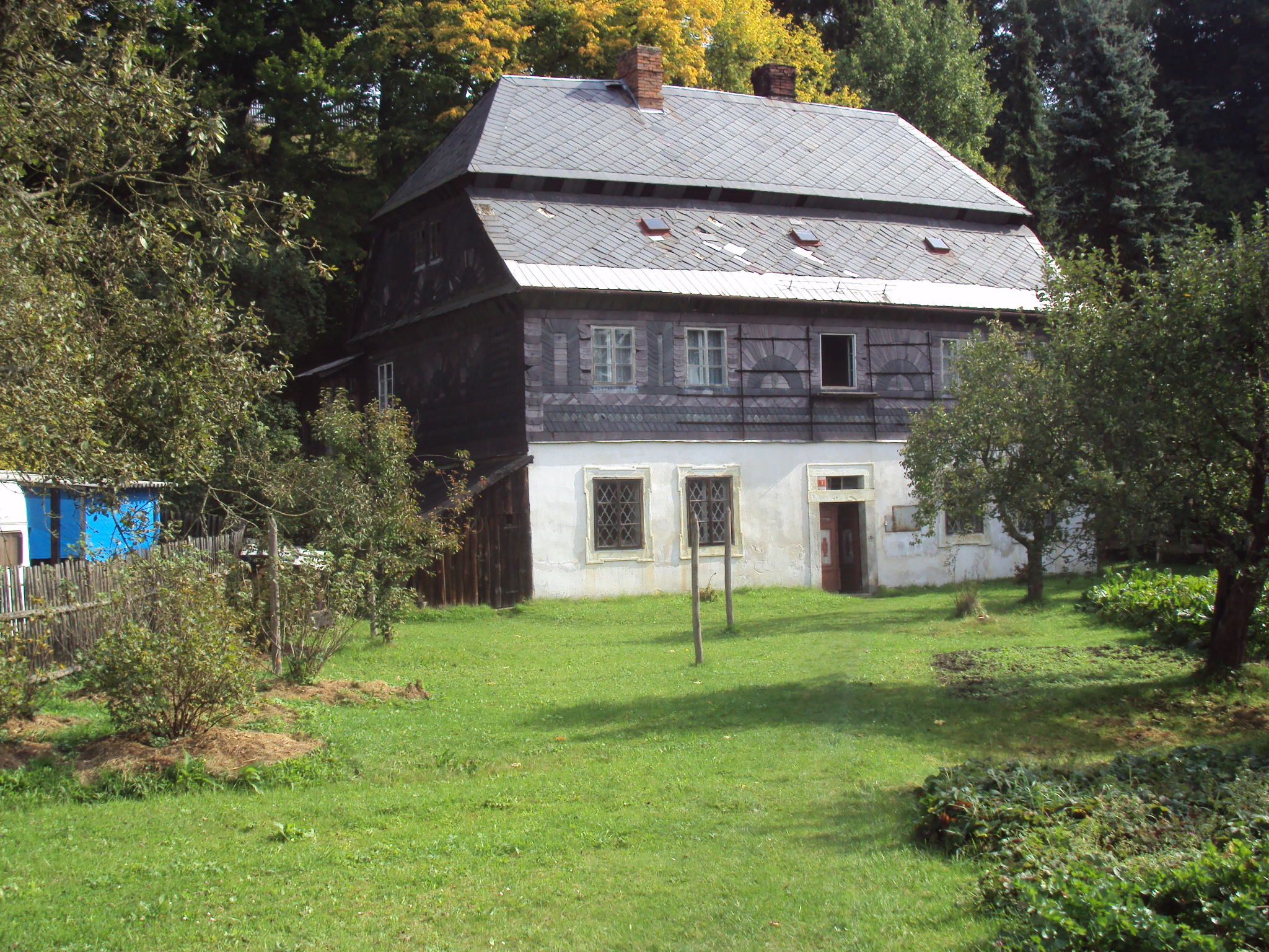 Fara ve Velenicích, č.p.1